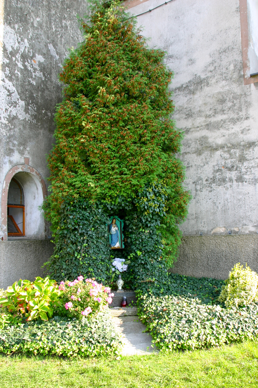 Biała (dodatkowa nazwa w j. niem. Zülz) – to miasto w woj. opolskim, w powiecie prudnickim.